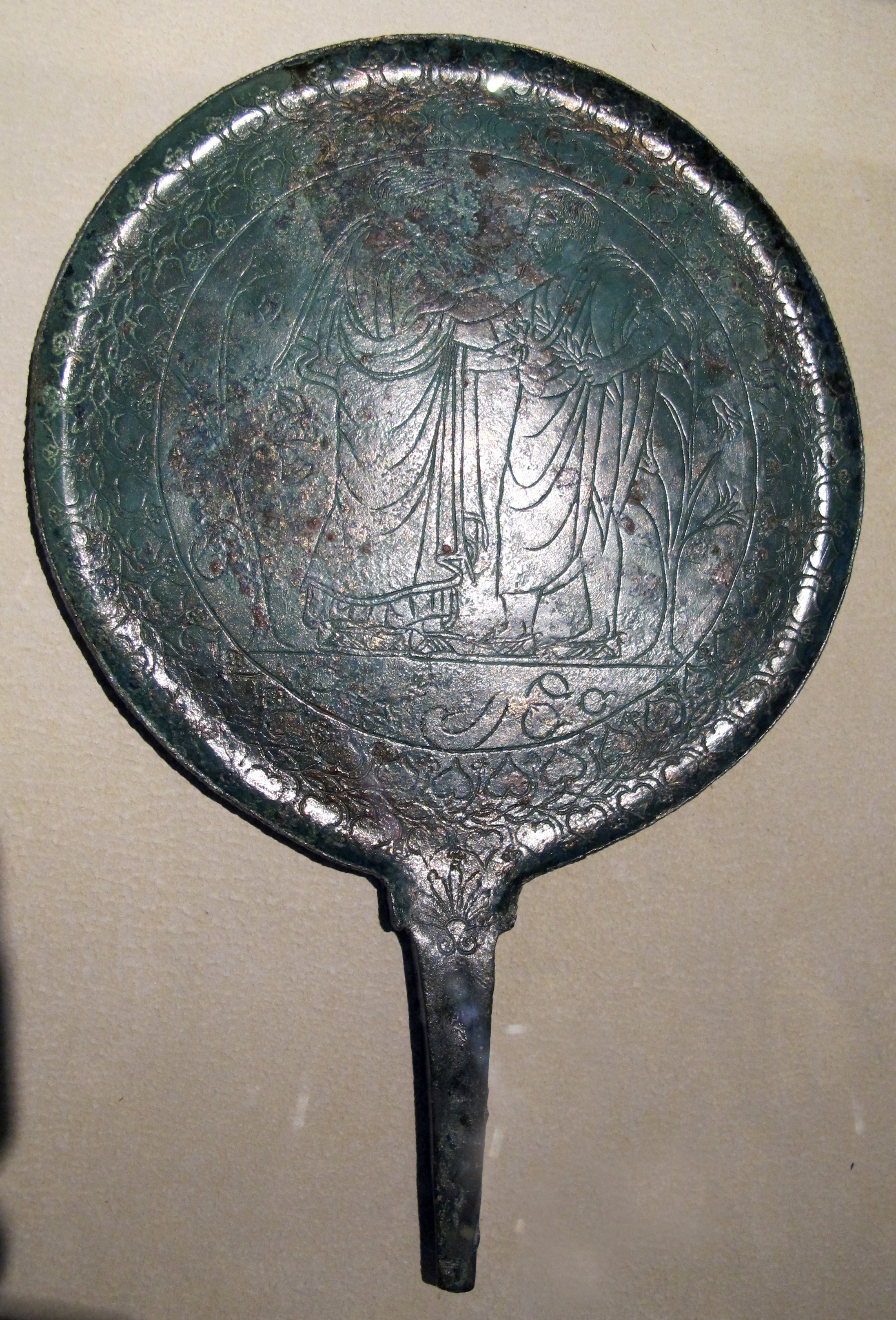 Etruscan mirrors in the Museo archeologico nazionale (Florence)